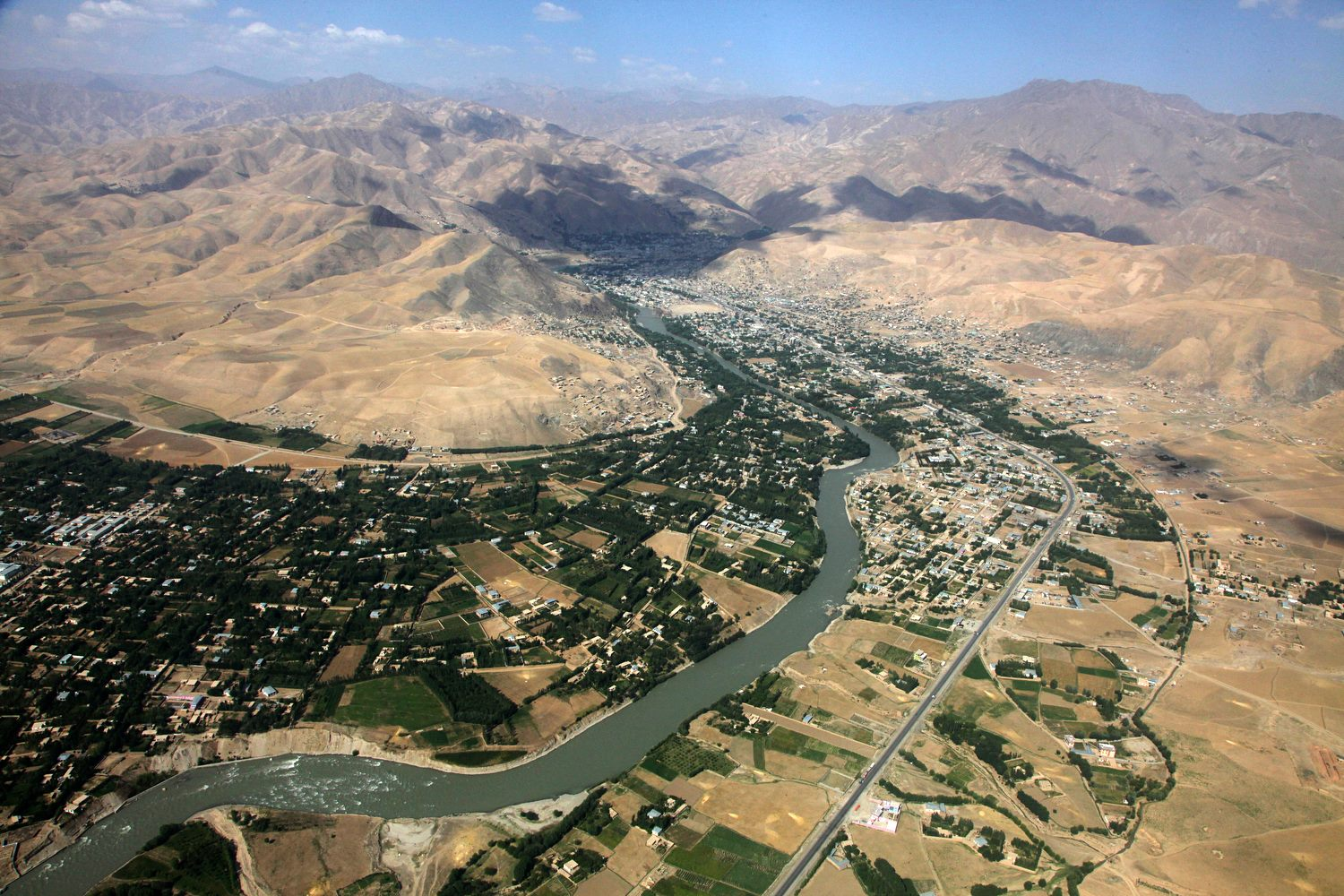 شهر فیض آباد استان بدخشان Тоҷикӣ: Шаҳри Фаӣзобод Вилояти Бадахшон.